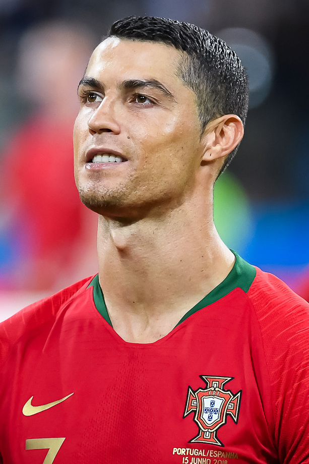 Хет-трик Роналду приносит Португалии ничью в пиренейском дерби